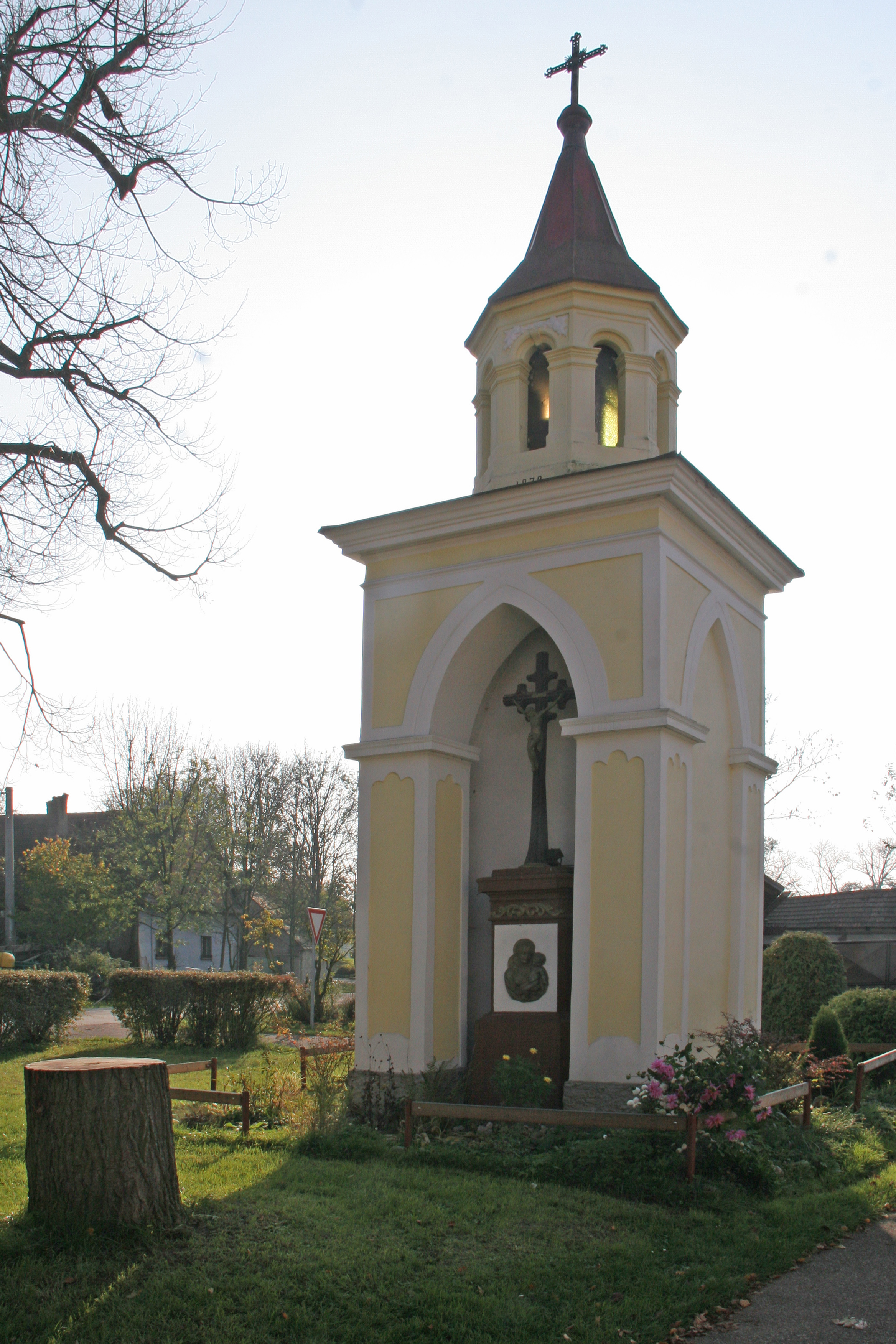 Janovičky kaple